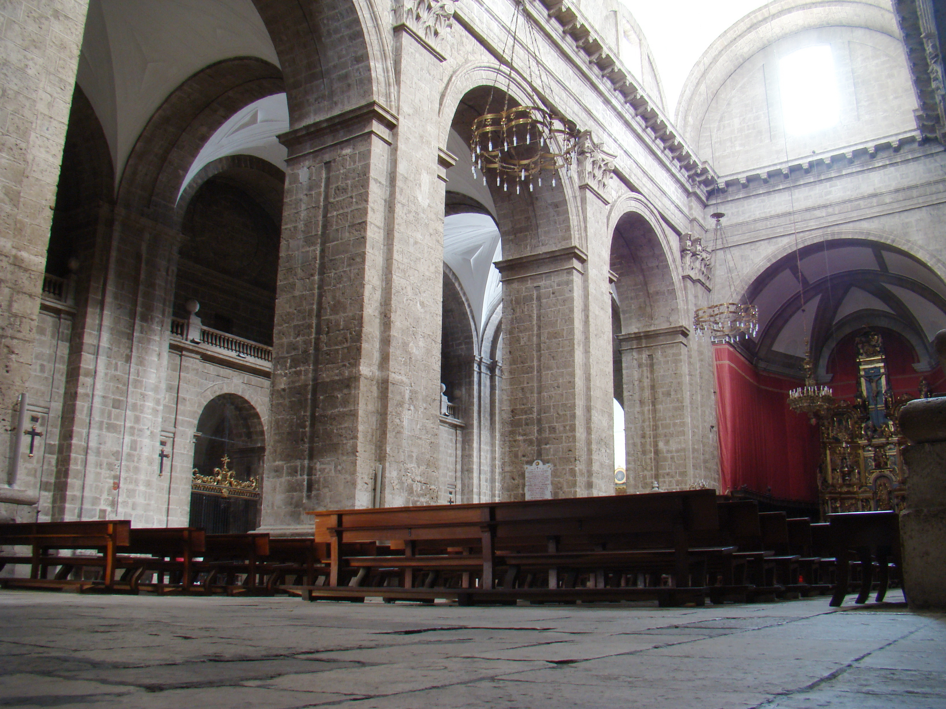 Valladolid, España. Nave del Evangelio de la catedral.